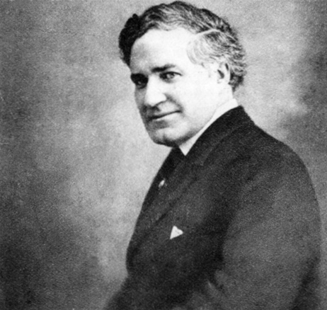 Hermann Georg Scheffauer (1878-1927) war ein deutsch-amerikanischer Schriftsteller und Übersetzer.